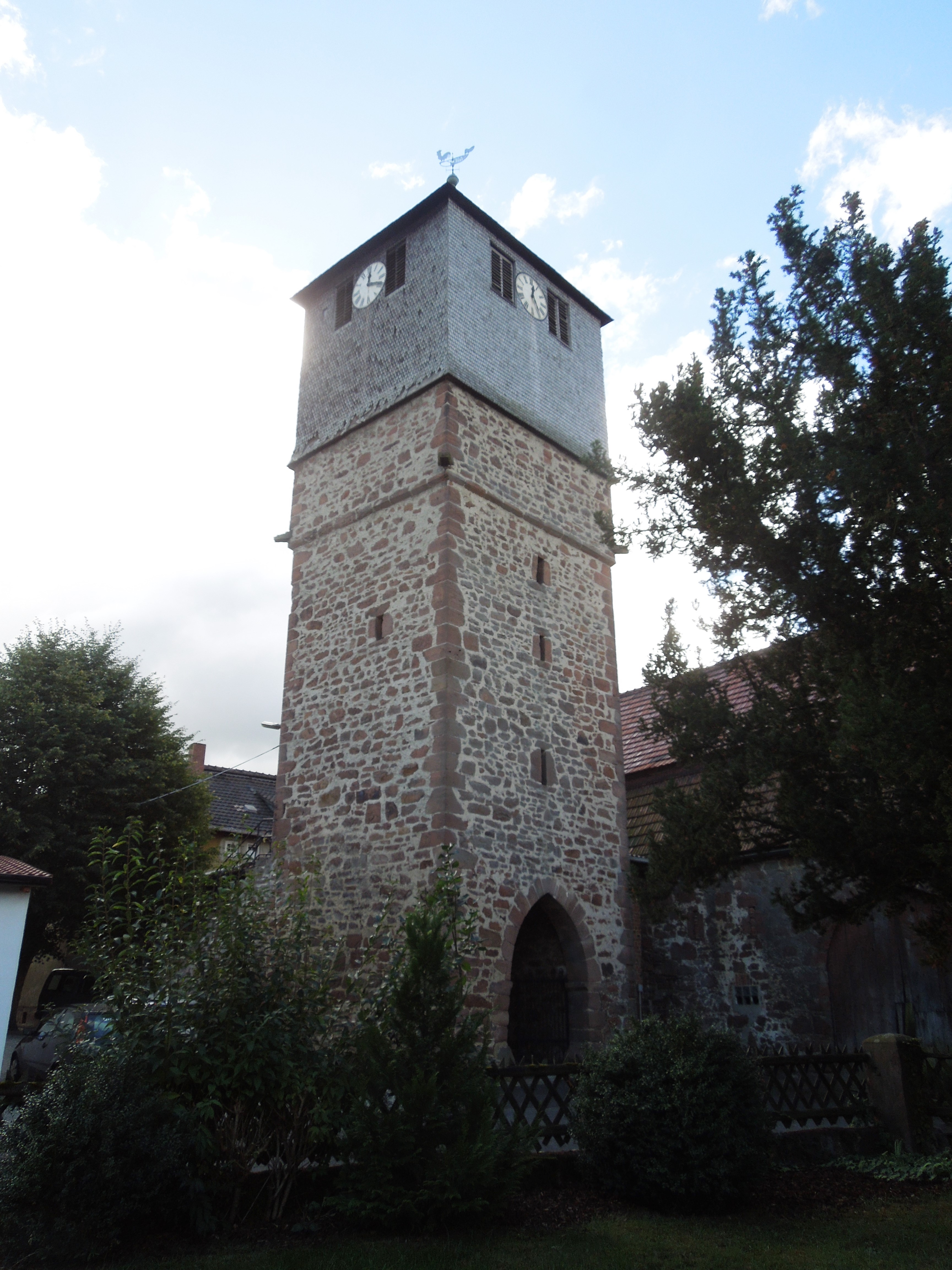 Der lange als Kirchturm genutzte ehemalige Wehrturm in Großenenglis